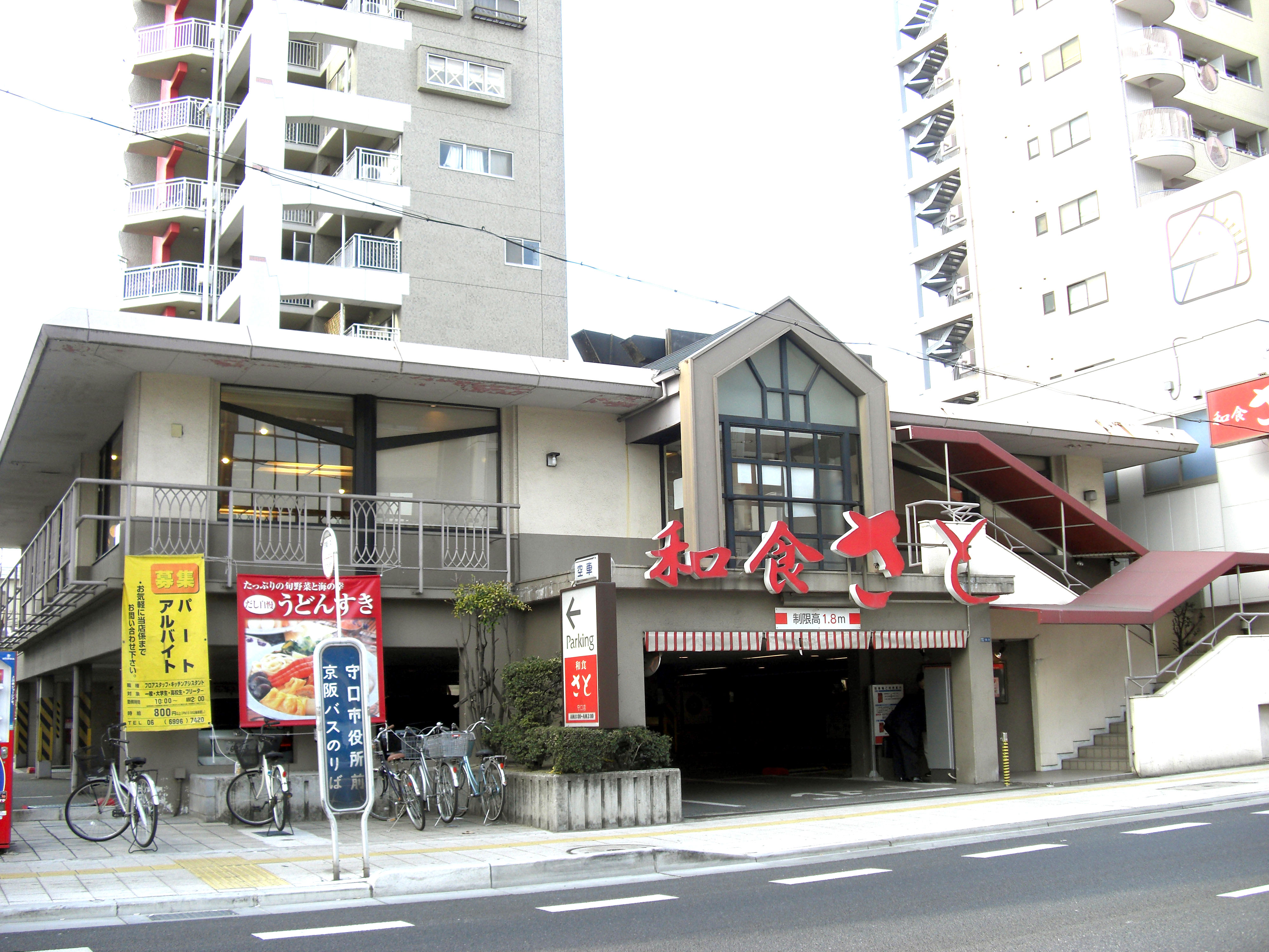 Sato Moriguchi,Keihan-hondouri Moriguchi-shi Osaka Japan.